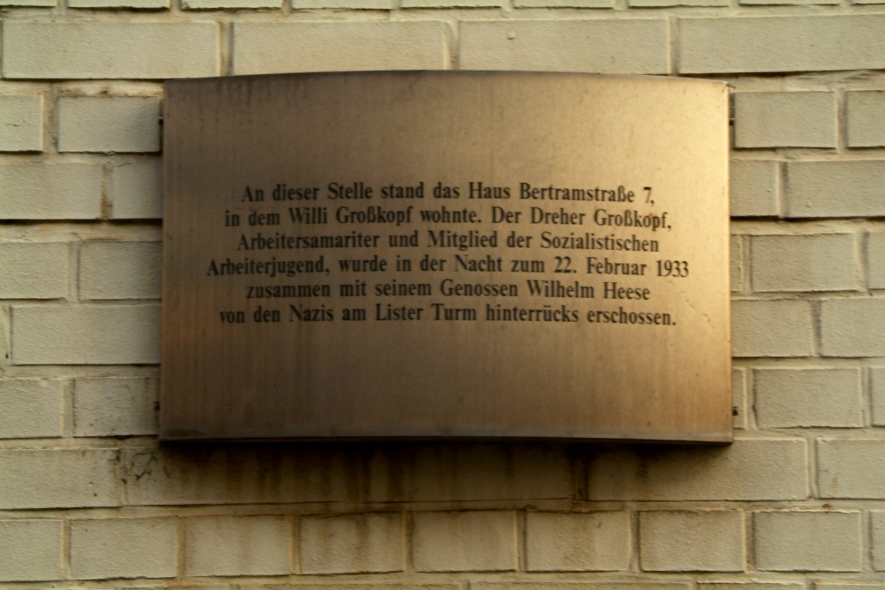 Gedenktafel für Willi (Wilhelm) Großkopf in Hannover, Bertramstraße 7. Er war Mitglied des Reichsbanners Schwarz-Rot-Gold ebenso wie Wilhelm Heese. Beide wurden bei einem Überfall der SA am Lister Turm am 22. Februar 1933 hinterrücks erschossen.